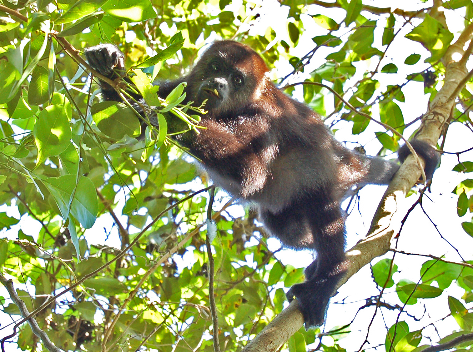 Fotografía de un juvenil de mono aullador negro en el municipio de Oxcabal, Campeche, México.